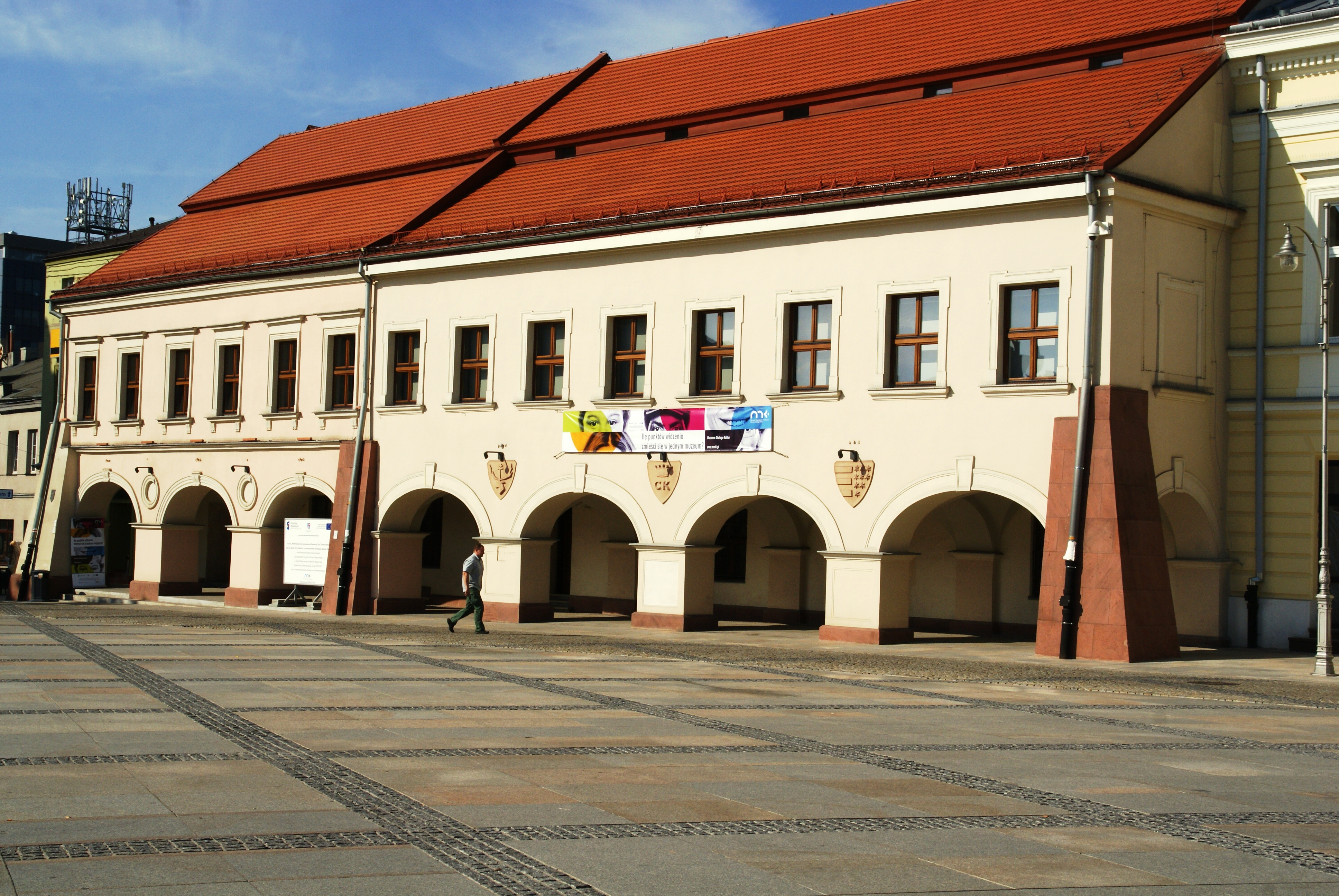 Dom Kielce Rynek 3, Kielce 359 z 23.06.1967.